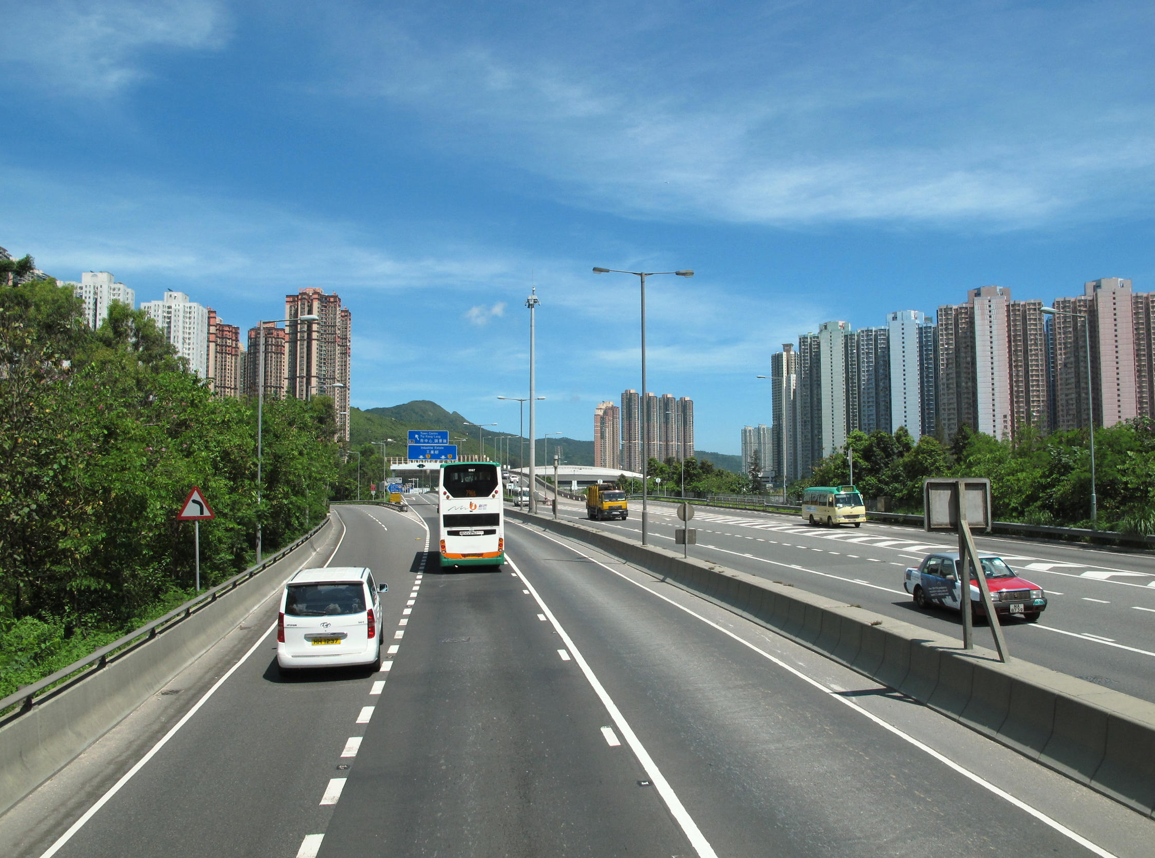 Tseung Kwan O Tunnel Road 將軍澳隧道公路